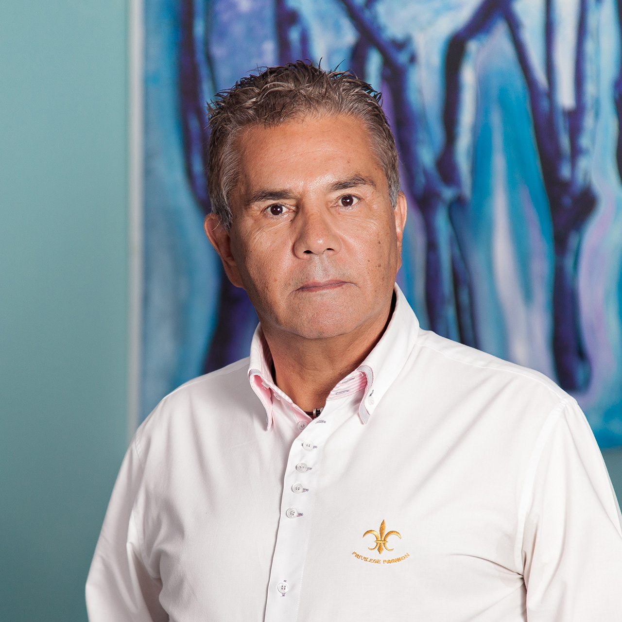 José Miguel Rodríguez Fraga, Alcalde de Adeje.